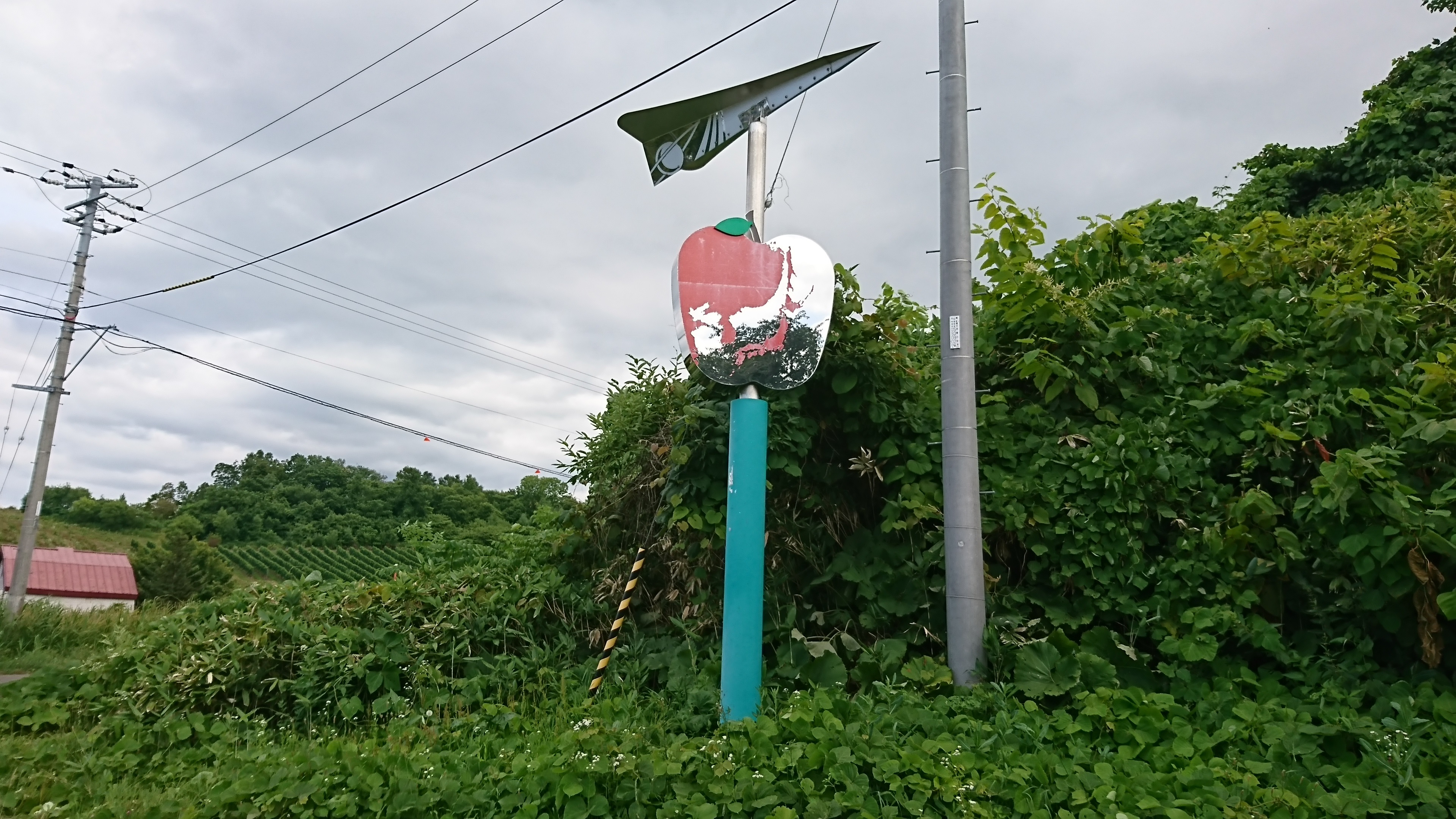 りんごをかたどったアップルポート余市の案内標識